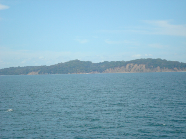 Isla San Lucas, en el Golfo de Nicoya, pacífico costarricense